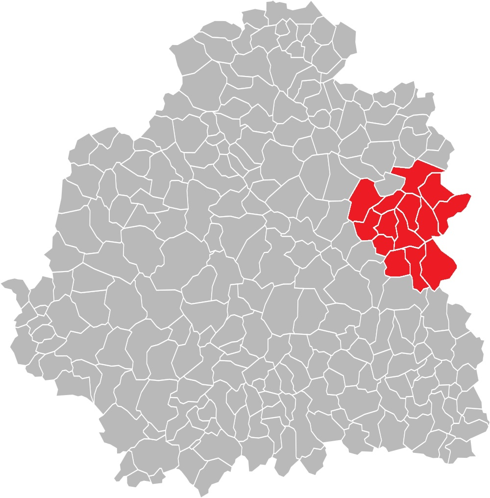 Carte des communes de l'Indre (36) : Le canton d'Issoudun-Sud, de 1801 à 2015.